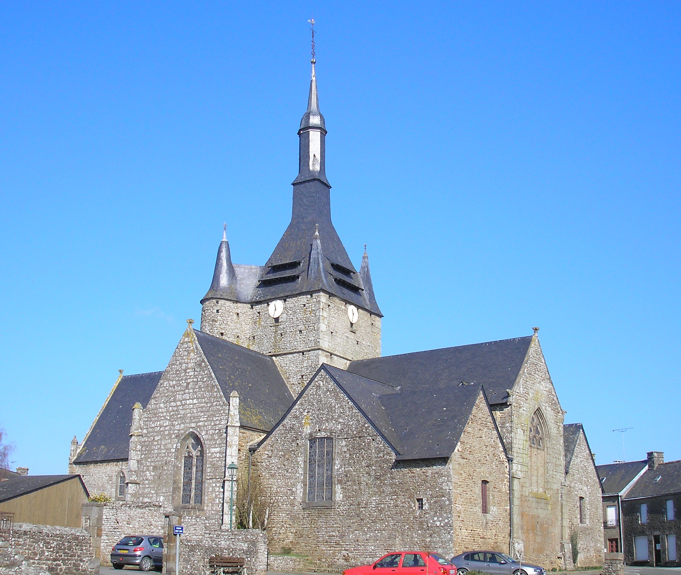 Brecé (Pays de la Loire, France). L'église.